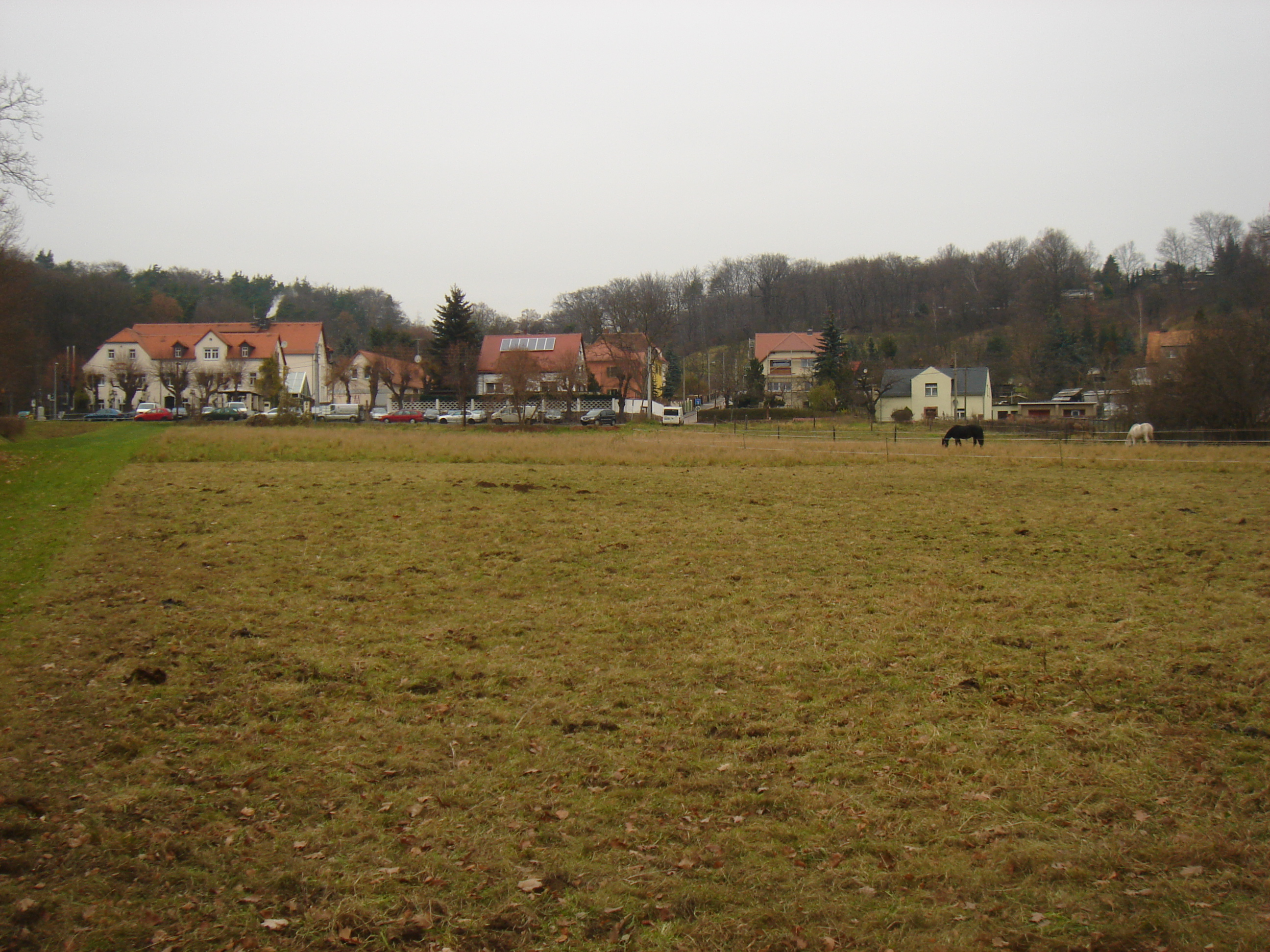 Die Baumwiese in Boxdorf, links das gleichnamige Gasthaus.